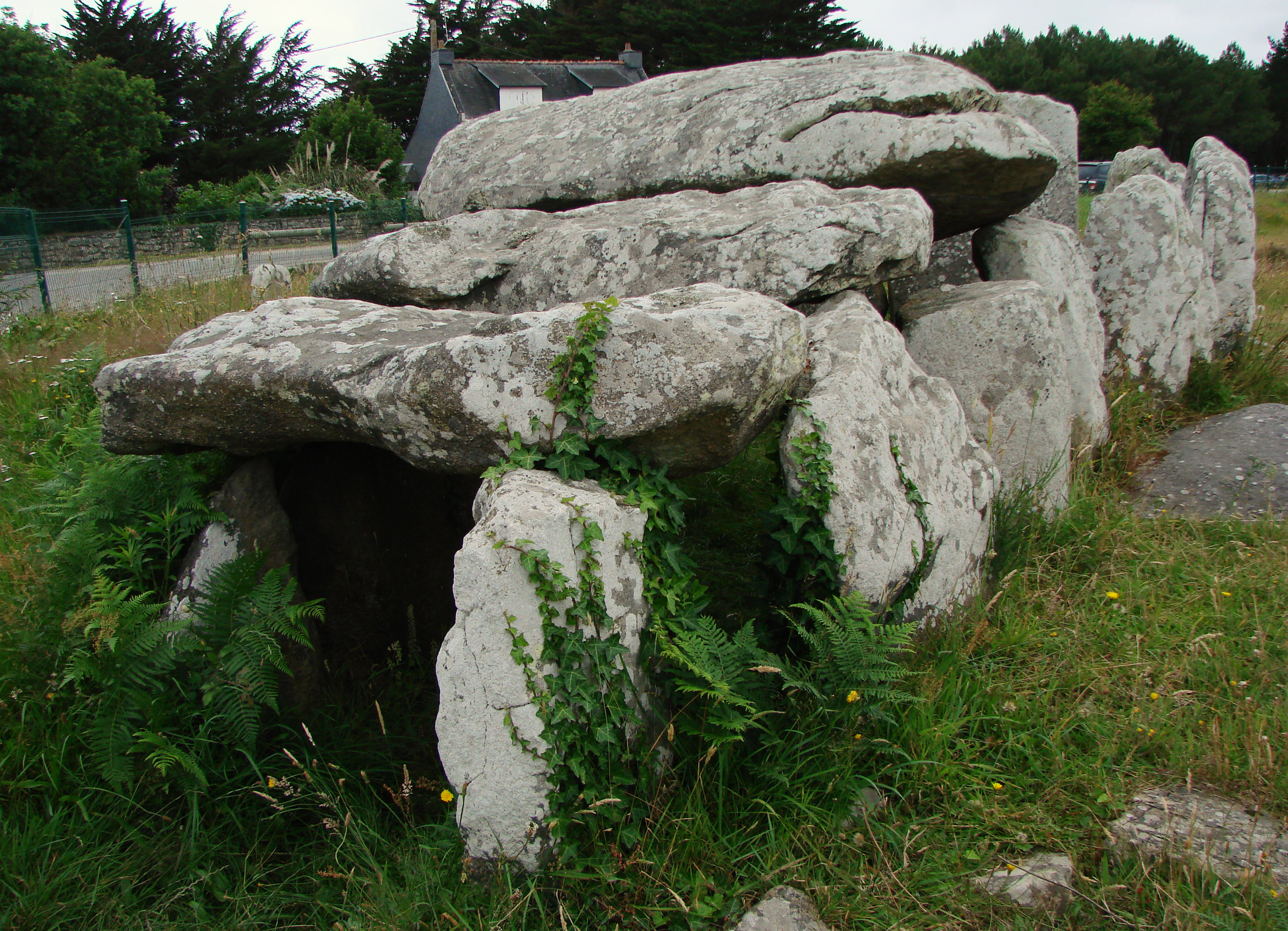 Carnac,les alignements de Kermario, le dolmen.Vue de trois-quarts de face.